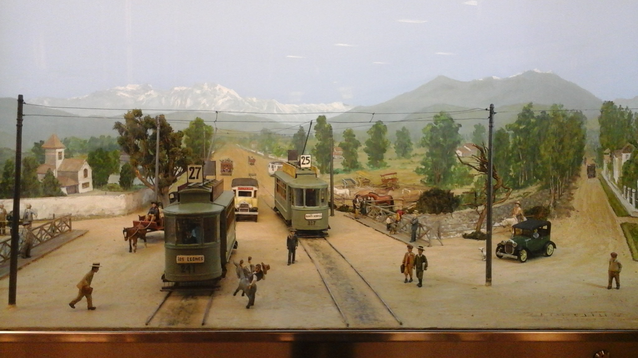 Diorama de Zerreitug en la estación de metro Tobalaba